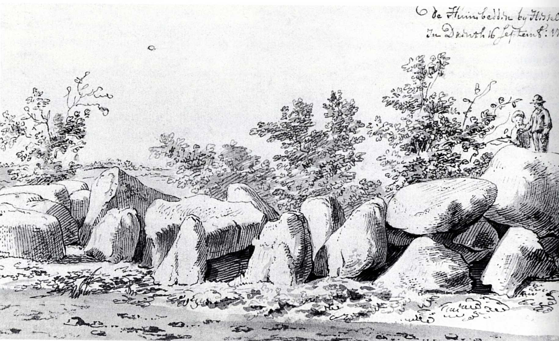 Hunebed